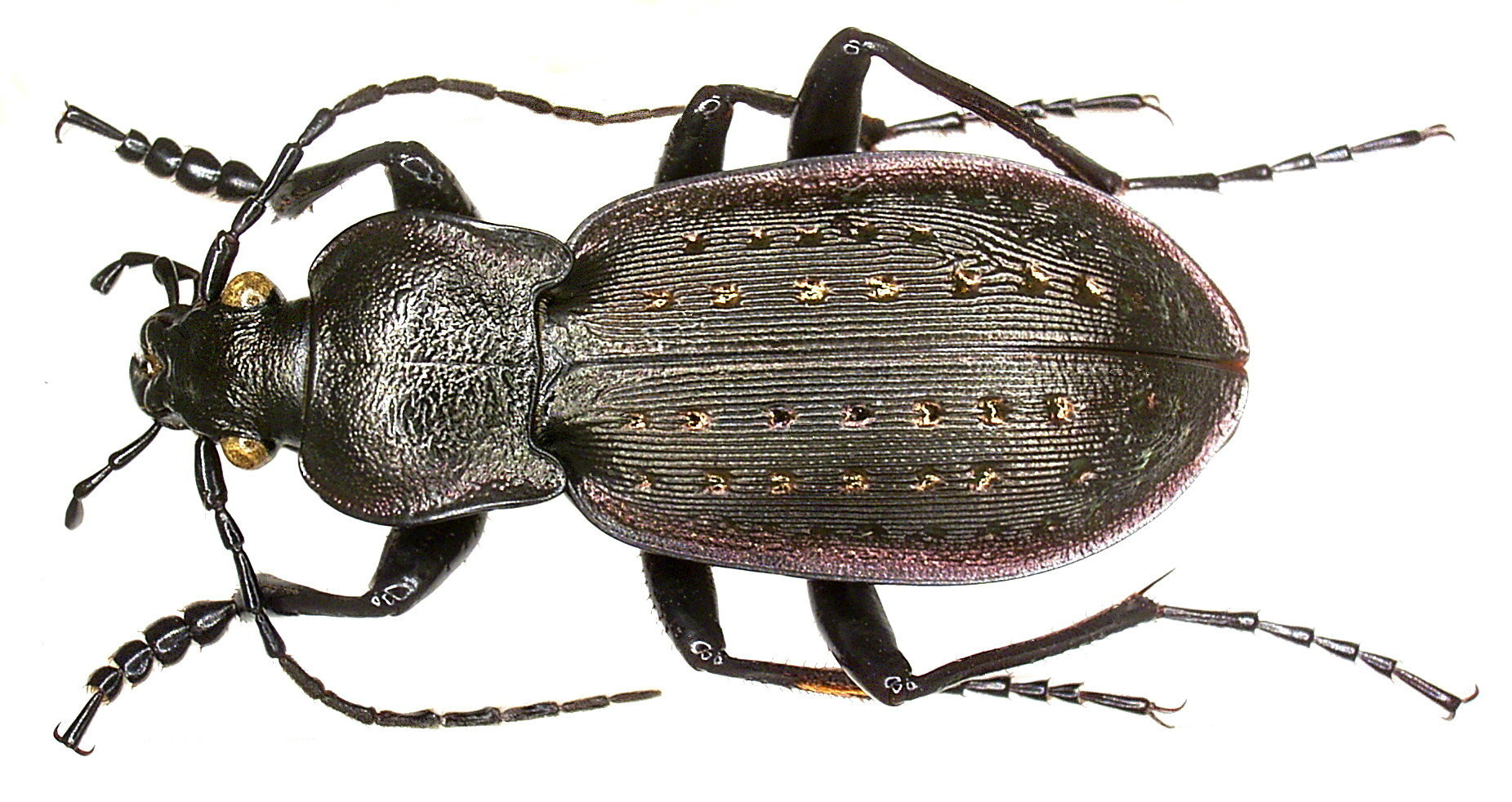 Familie: Carabidae Grösse: 23-30 mm Verbreitung: Europa Fundort: Germania, Bayern, Oberfranken, Geroldsgrün, Langenau leg.det. U.Schmidt, 2006 Foto: U.Schmidt, 2006